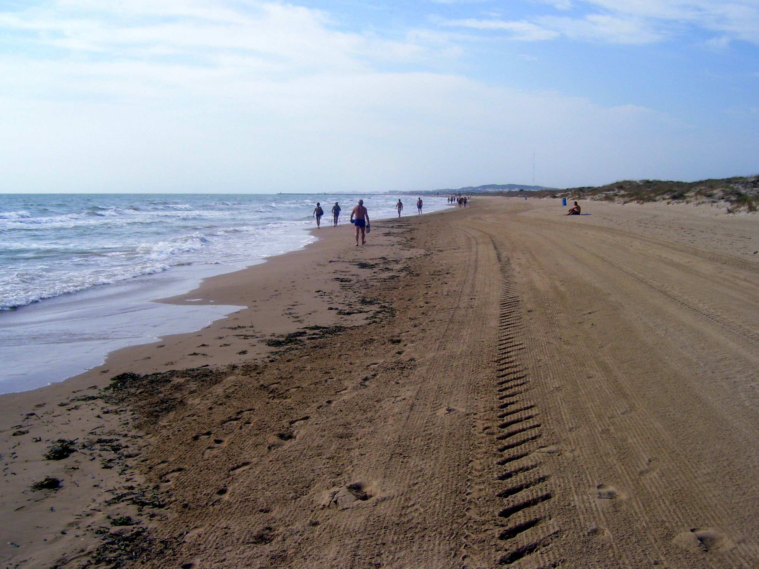 Playa de la Marina, Elche, Provincia de Alicante, Espana